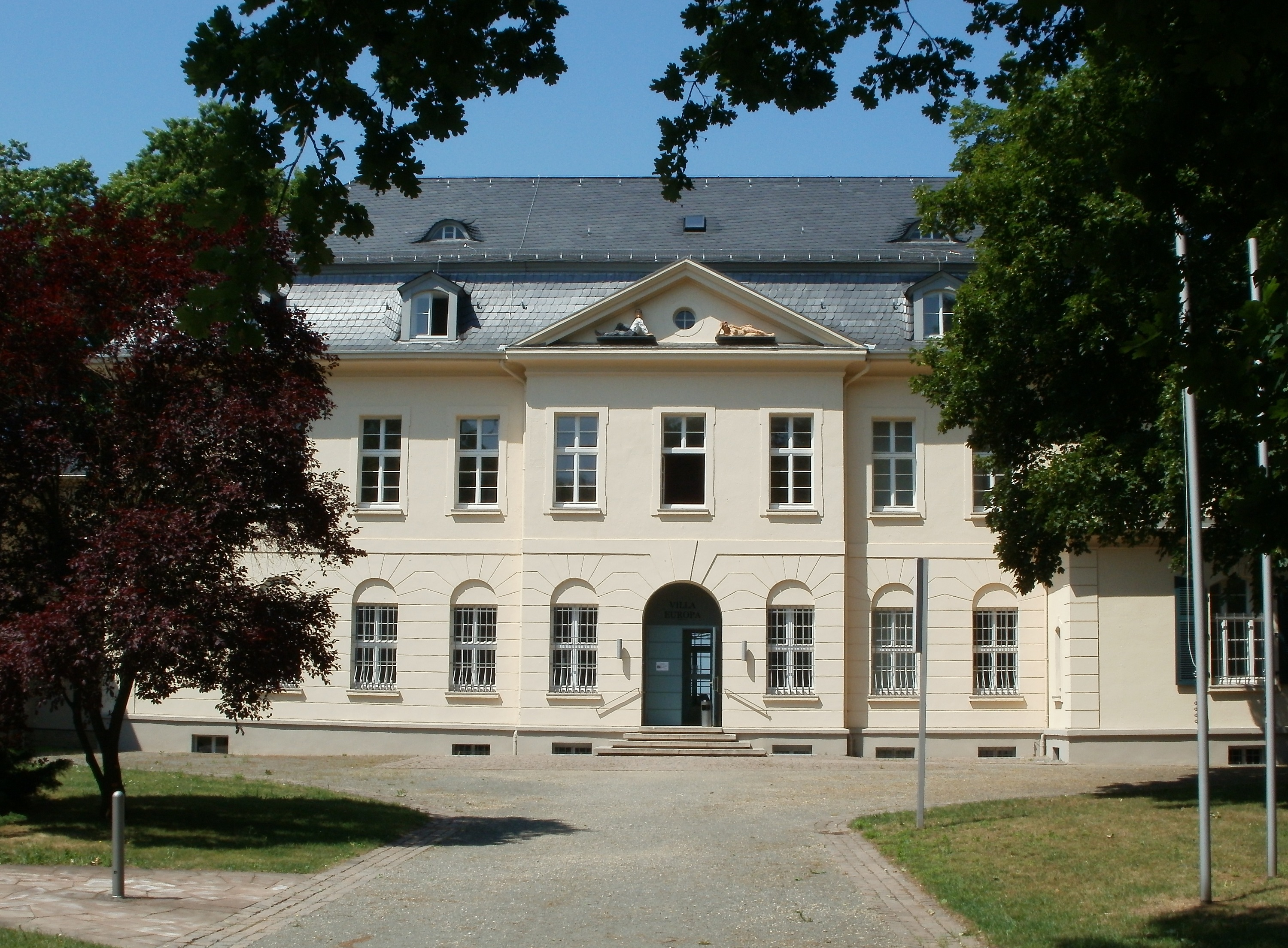 Kohlweg 7 (Saarbrücken)